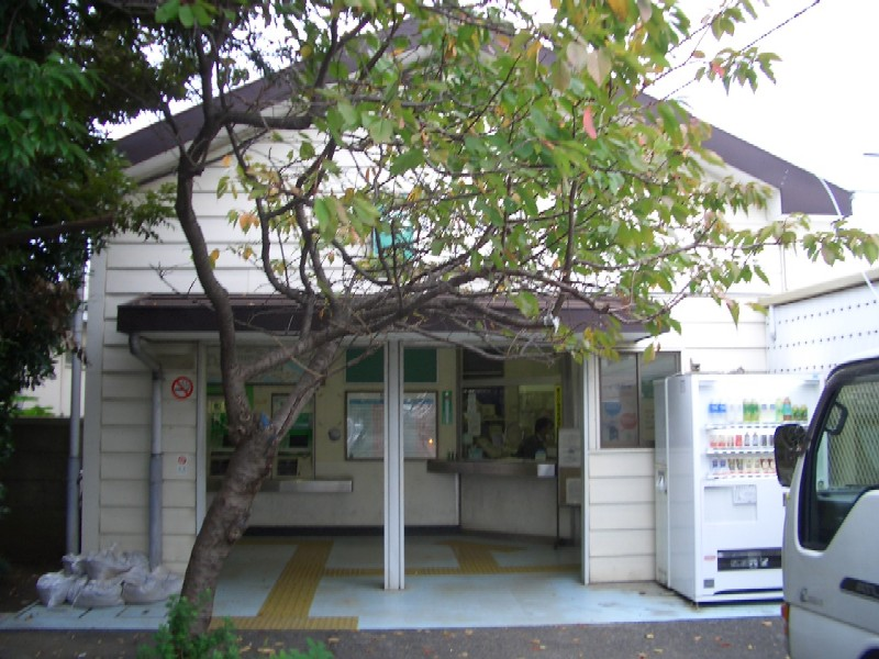 Kita-Chigasaki Station on JR Sagami Line, Chigasaki, Kanagawa 北茅ヶ崎駅